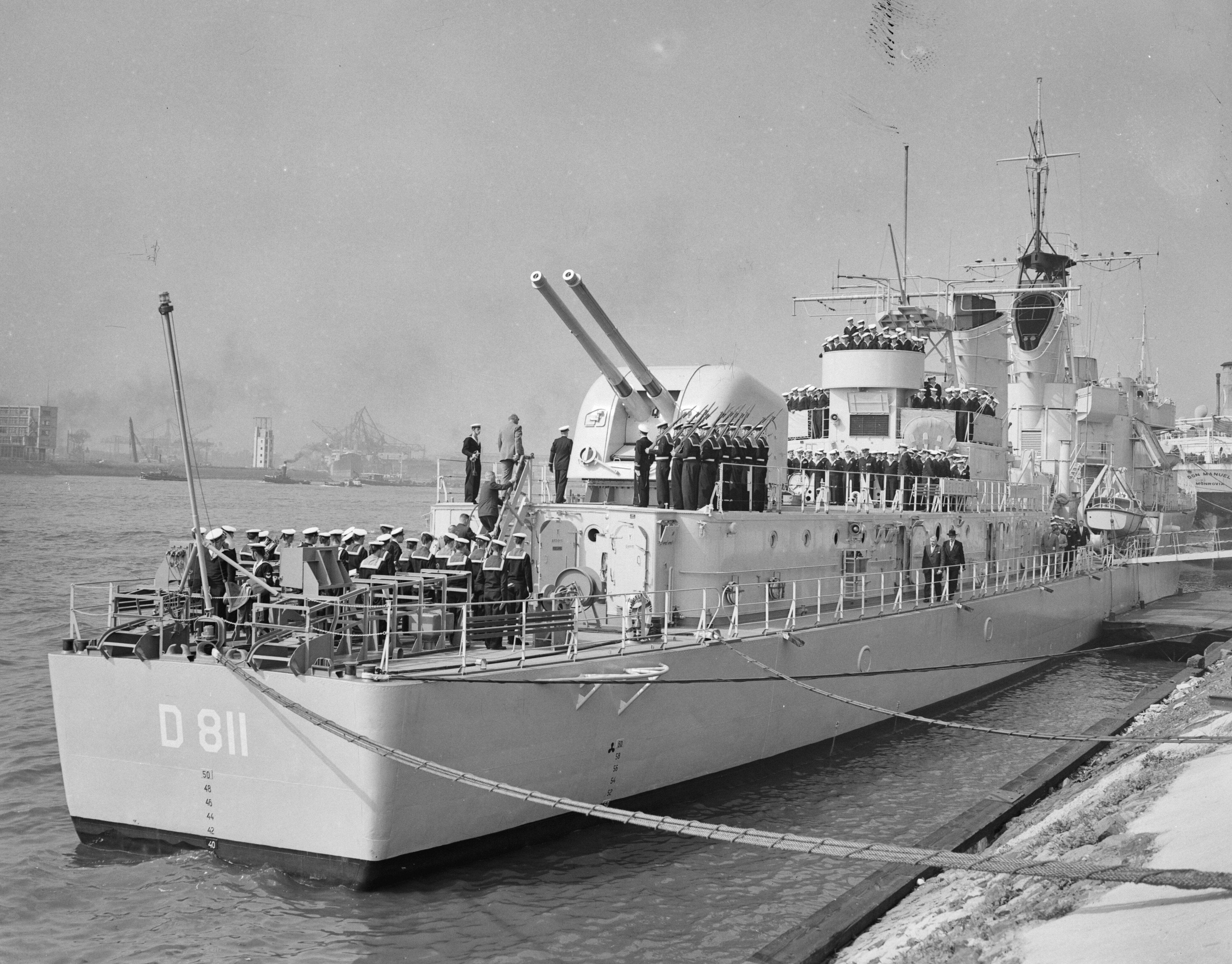 Collectie / Archief : Fotocollectie Anefo Reportage / Serie : [ onbekend ] Beschrijving : Indienststelling onderzeebootjager "Gelderland" Rotterdam Datum : 17 augustus 1955 Locatie : Rotterdam, Zuid-Holland Trefwoorden : Indienststellingen, onderzeebootjagers Fotograaf : Pot, Harry / Anefo Auteursrechthebbende : Nationaal Archief Materiaalsoort : Negatief (zwart/wit) Nummer archiefinventaris : bekijk toegang 2.24.01.04 Bestanddeelnummer : 907-2821